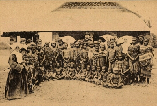 Nsona-Mbata, premières filles de la Charité de Saint Vincent de Paul avec les enfants et les pères rédemptoristes. Vers 1910.